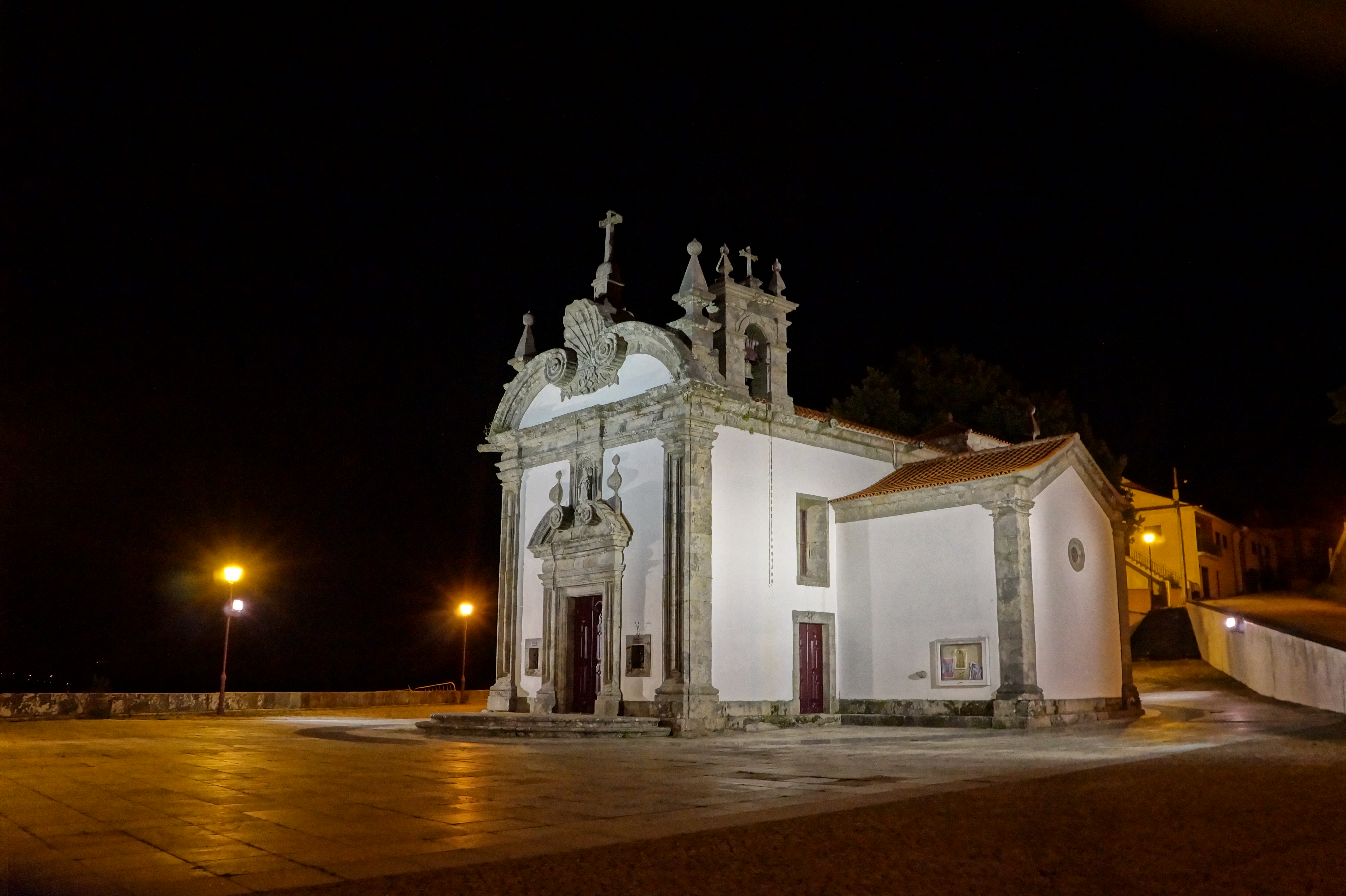 Capela da senhora da Guia à noite